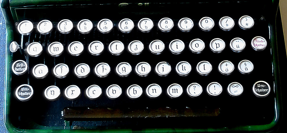 Tastatur einer Erika Nr.5 Schreibmaschine in Fraktur